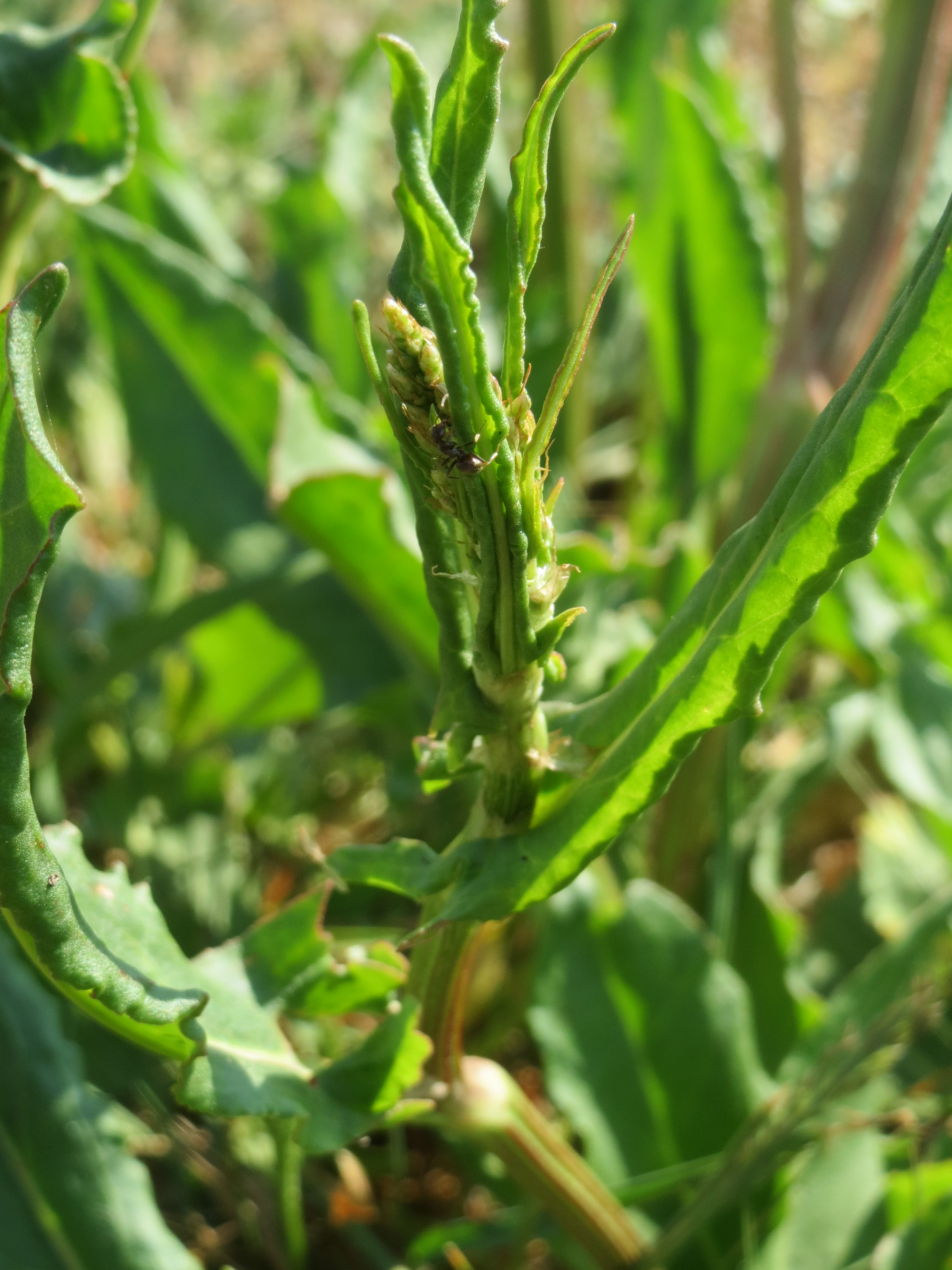 Wiesen-Sauerampfer (Rumex acetosa) am Kraichbach im Hockenheimer Rheinbogen